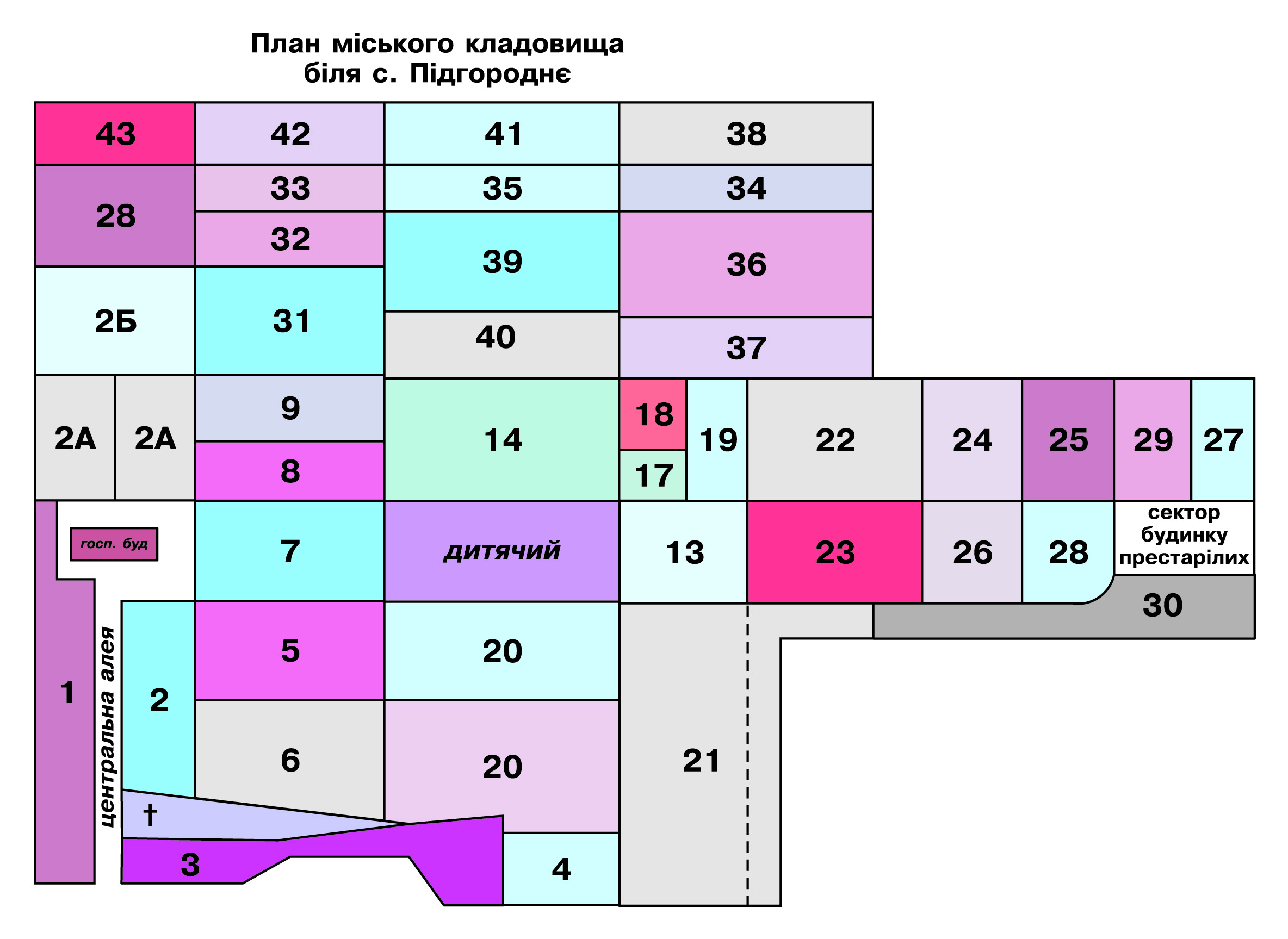 План тернопільського Міського кладовища біля с. Підгороднього.